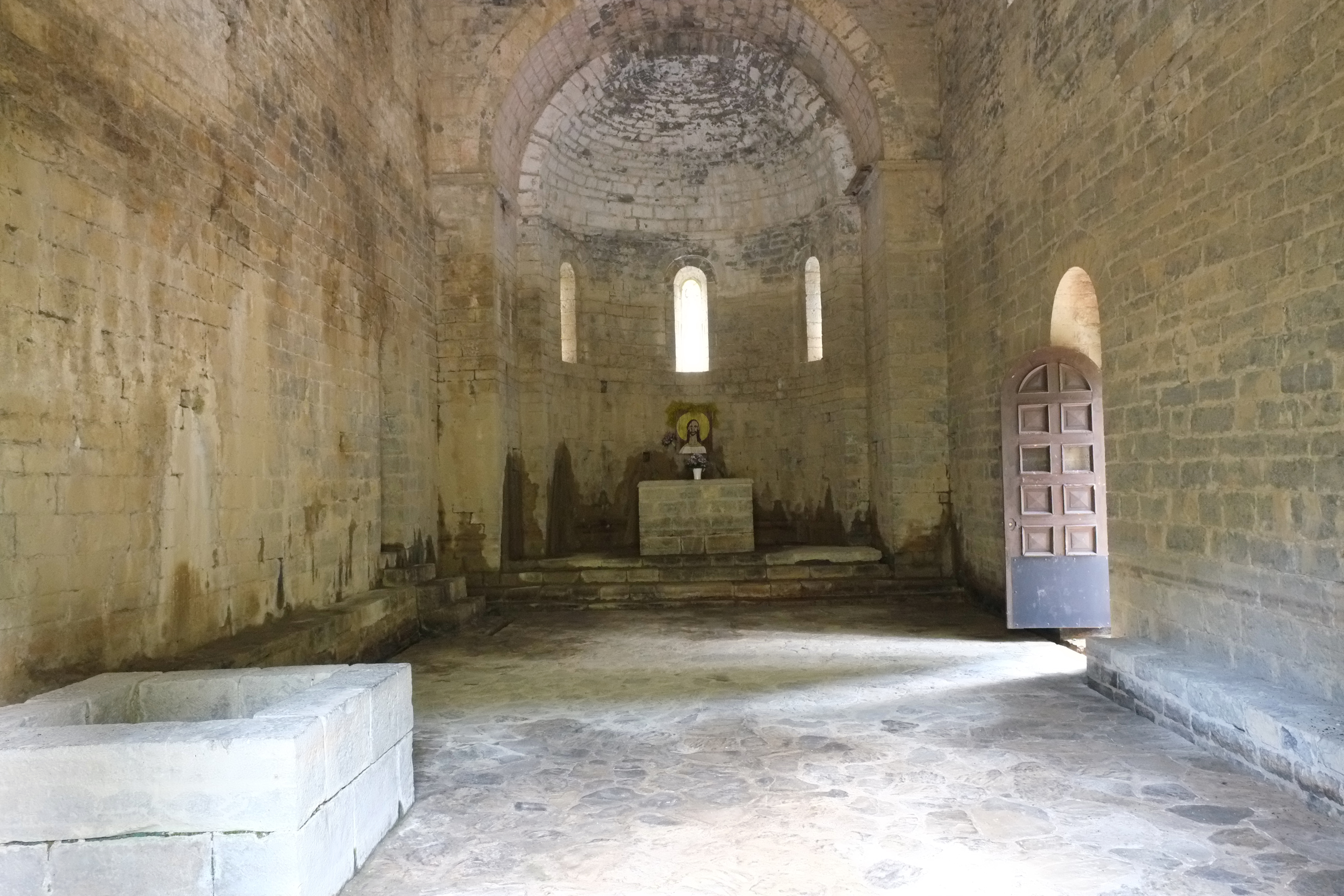 Ehemalige Klosterkirche San Adrián de Sasabe in Borau in der Provinz Huesca in Aragonien (Spanien)